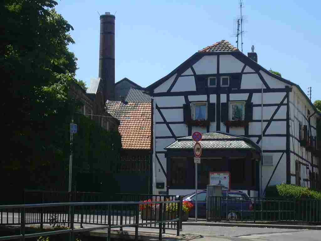 Birgel bei Düren, ehem. Schnapsbrennerei und Wirtschaft Gottschalk Ecke Berg-/Bachstr. own work papa1234 2006-07-16